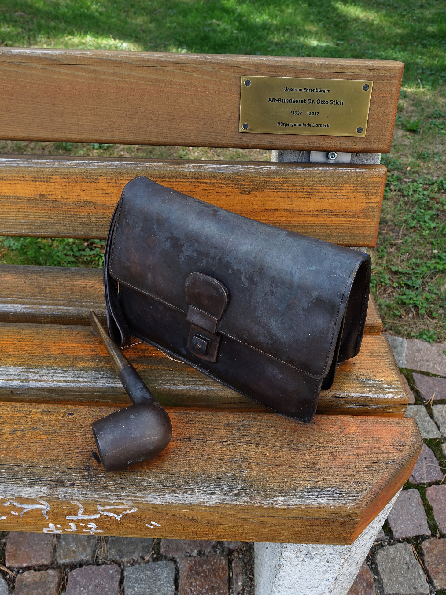 Anton Otto Stich (1927–2012) Ehrenbürger von Dornach, Solothurn. Sitzbank vor dem Heimatmuseum Dornach